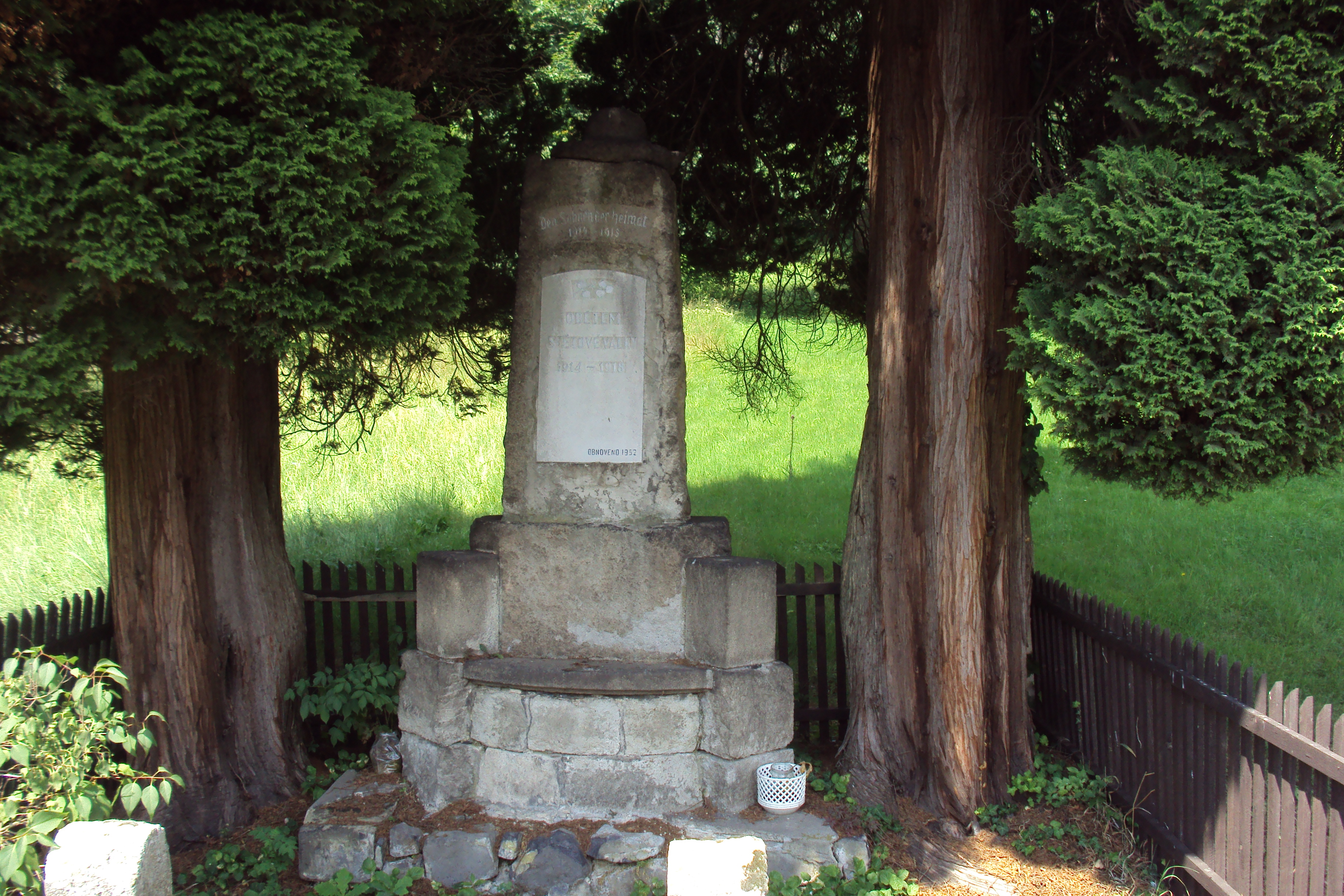 Pomník obětem války v obci Slunečná